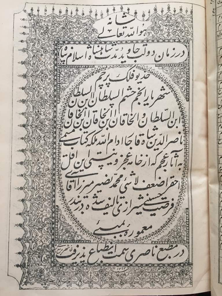 صفحه آغازین نخستین چاپ آثار عجم